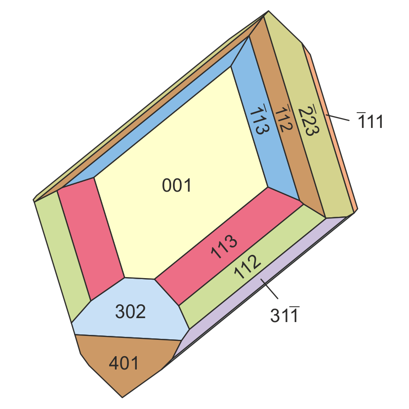 Kristallzeichnung eines Magnesiopascoit-Kristalls unter Zugrundelegung einer Vorlage in Anthony R. Kampf & Ian M. Steele (2008): „Magnesiopascoite, a new member of the pascoite group: description and crystal structure“. - The Canadian Mineralogist 46 (3), Seite 682.